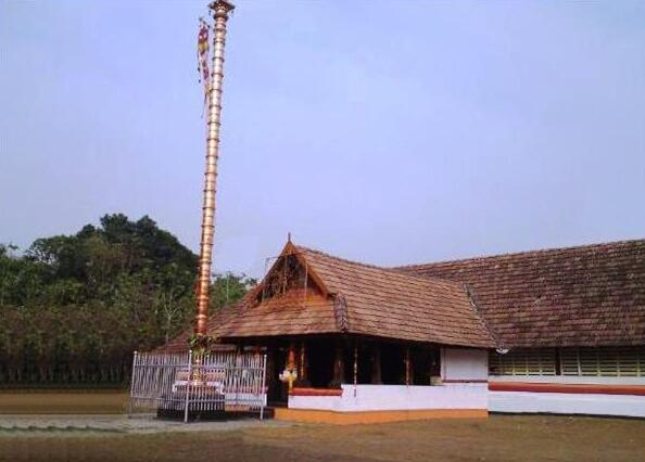 ഉളിയന്നൂർ മഹാദേവക്ഷേത്രം, ആലുവ